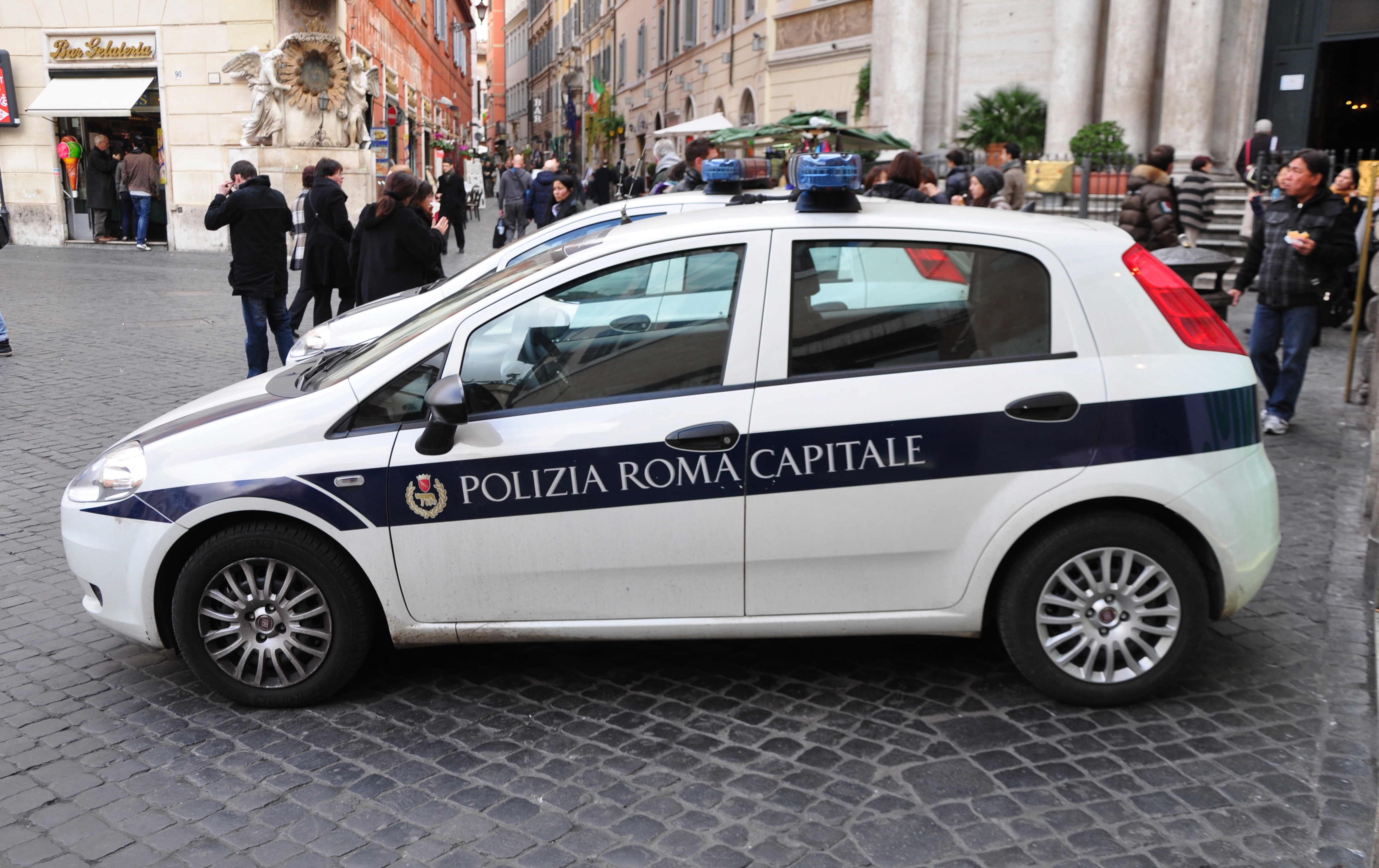 Rome, police vehicle